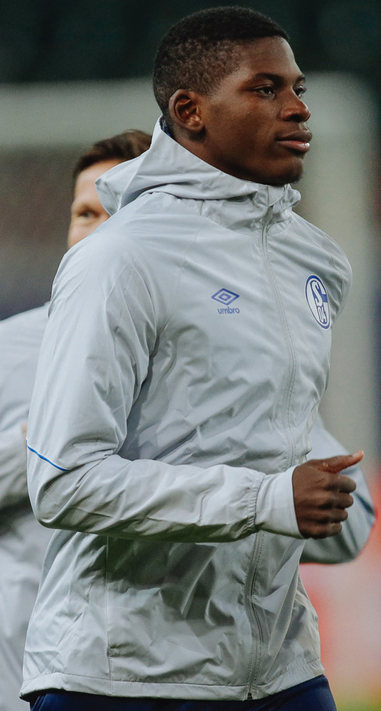 «Шальке» провел тренировку перед матчем с «Локомотивом»